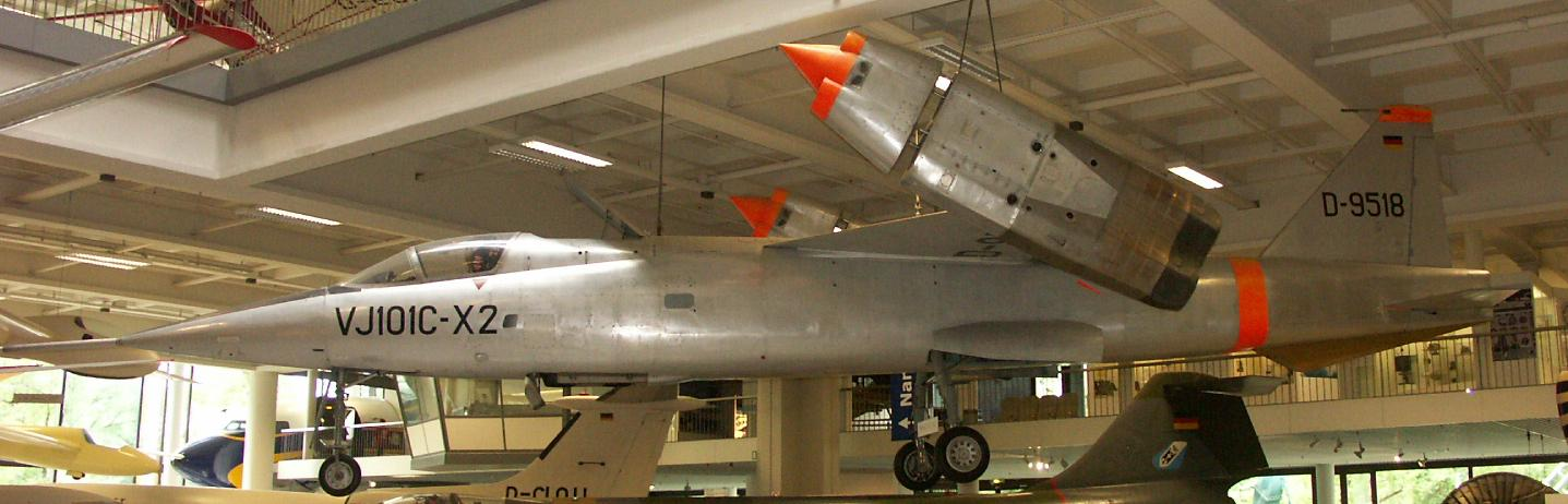 Deutsches Museum Munich Photo by Jean-Patrick Donzey